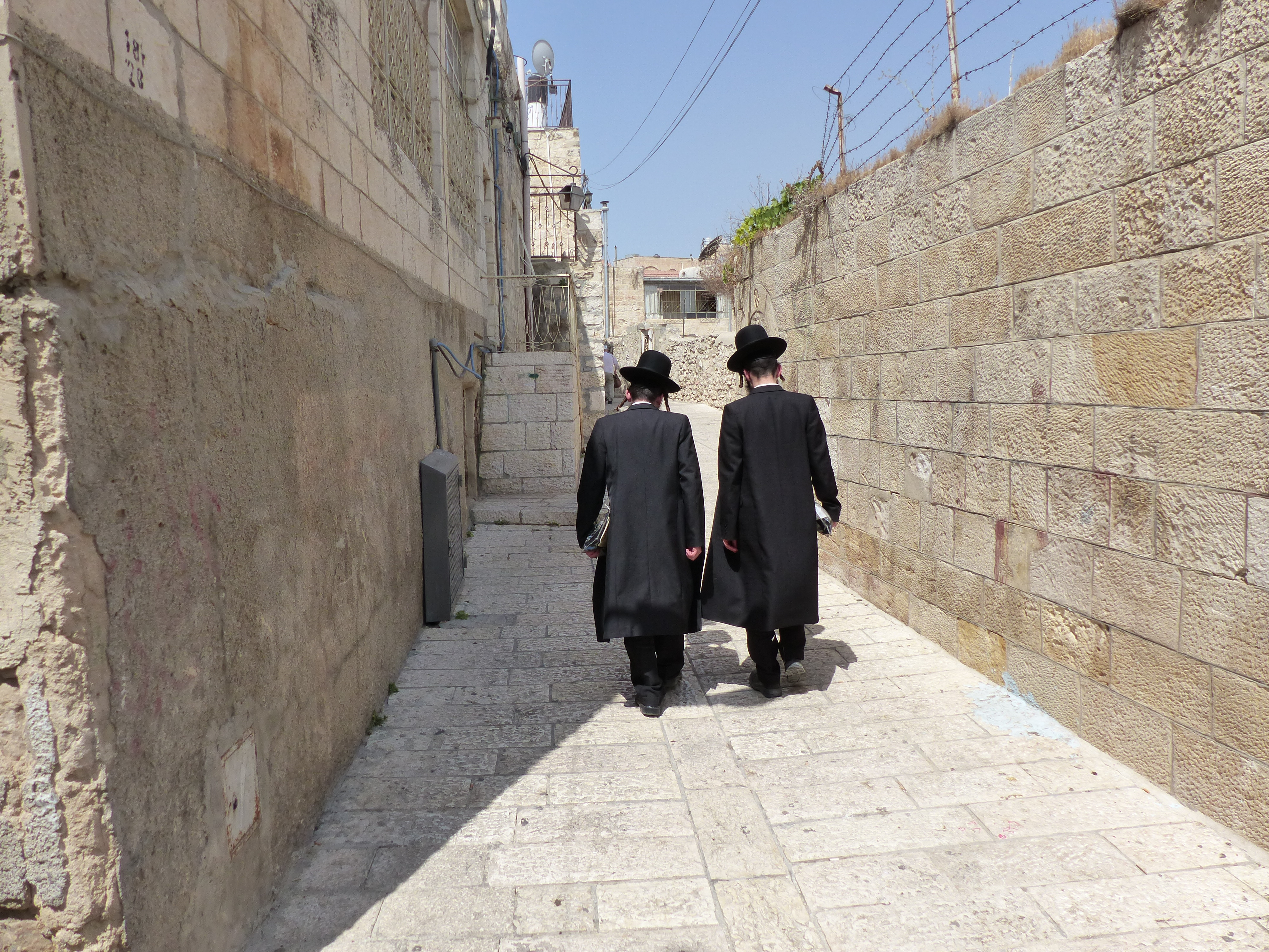 Judíos ortodoxos en Jerusalén, Israel